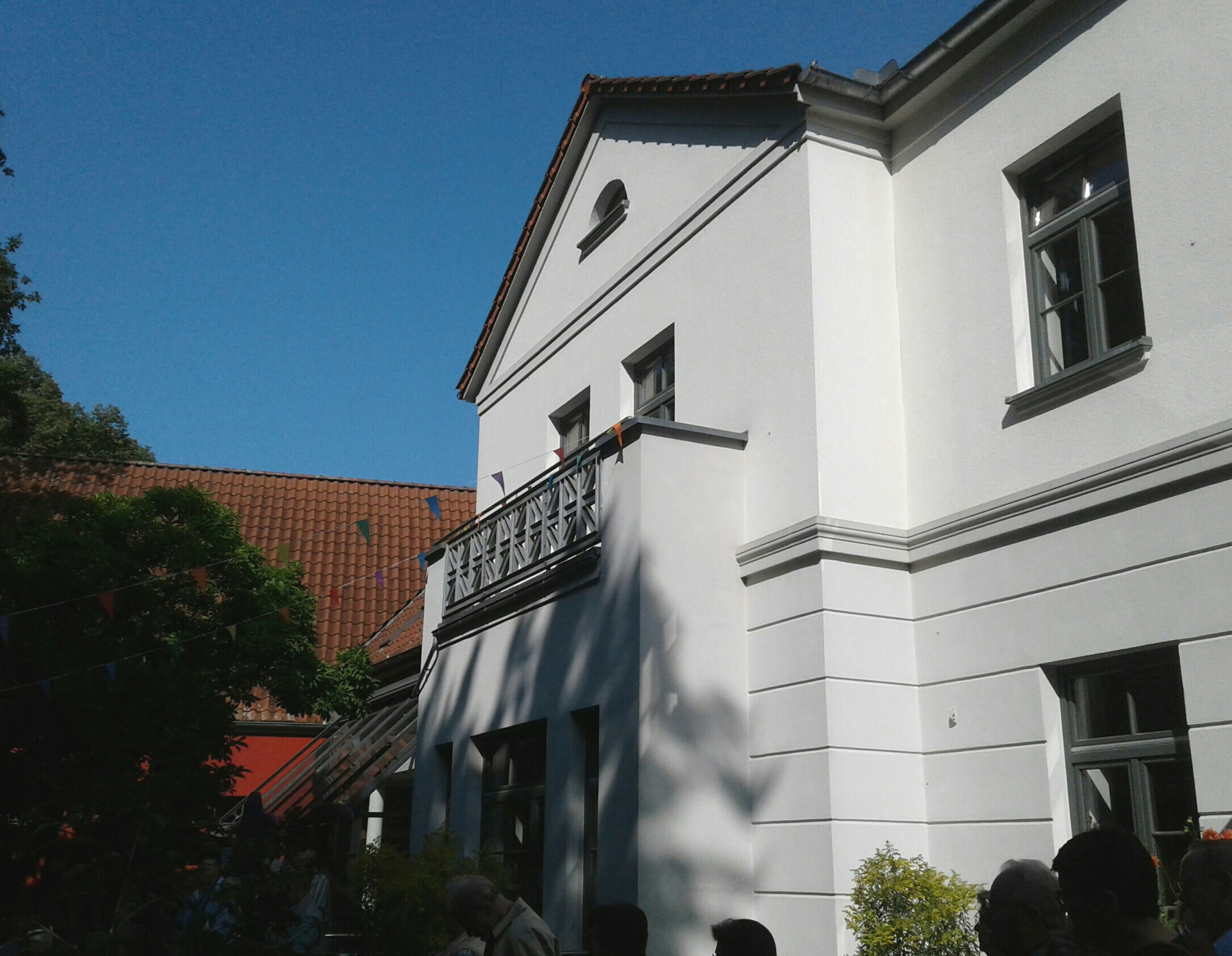 Das Haus unter den Linden Herford zur Gartenseite betrachtet.